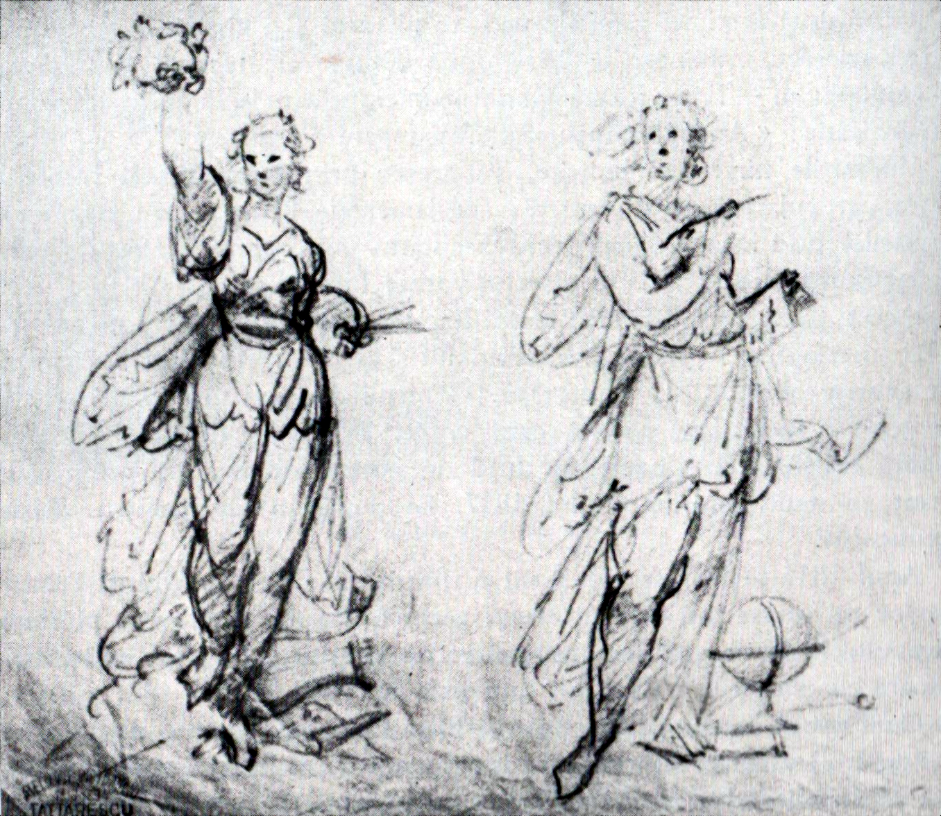 Gheorghe Tattaresscu - Pictura și Știința, desen în creion, 0.18x0.22m - Muzeul Gheorghe Tattarescu